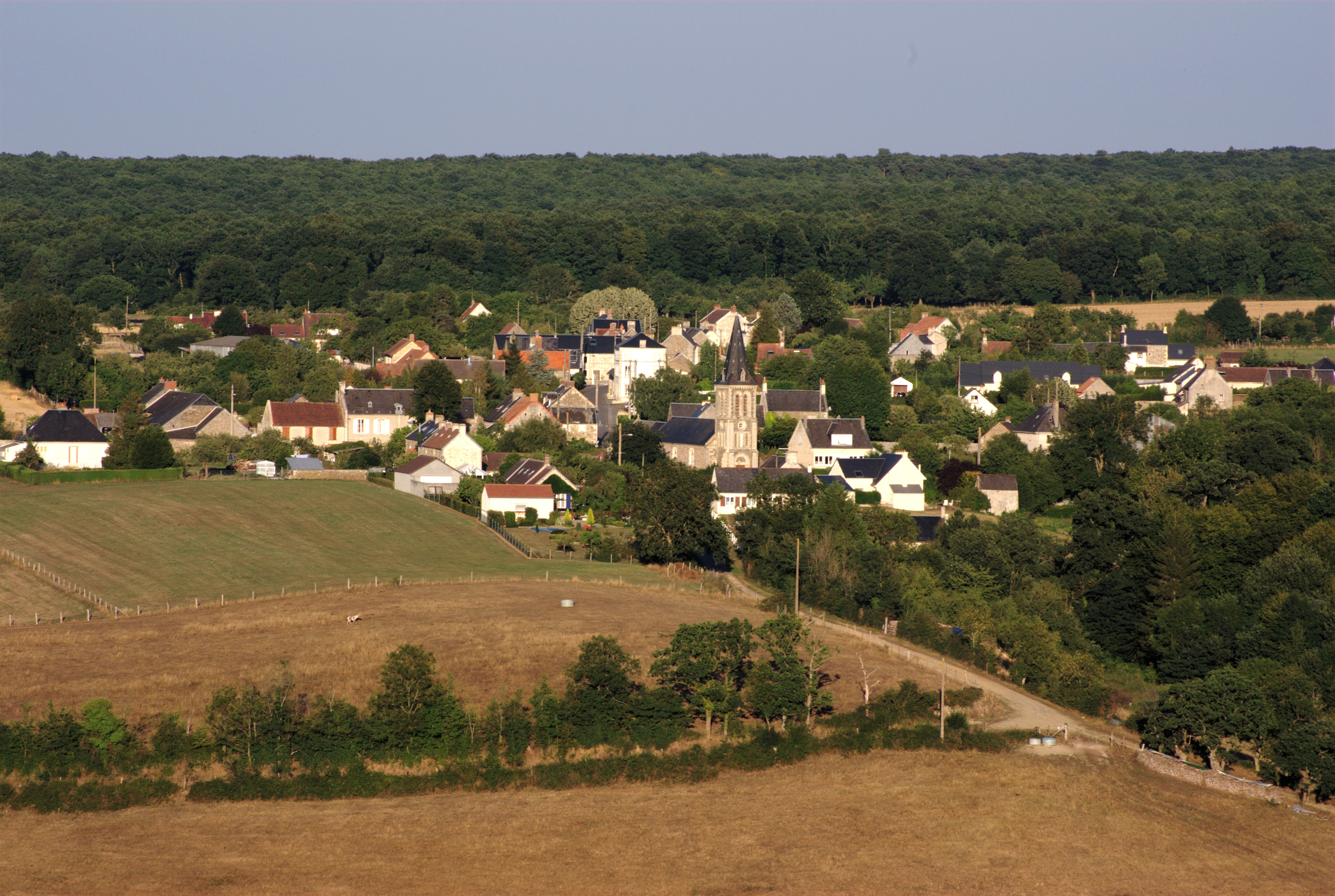 Le village de Grimbosq (14) adossé à la forêt du même nom, la vallée de la rivière Orne en contrebas.